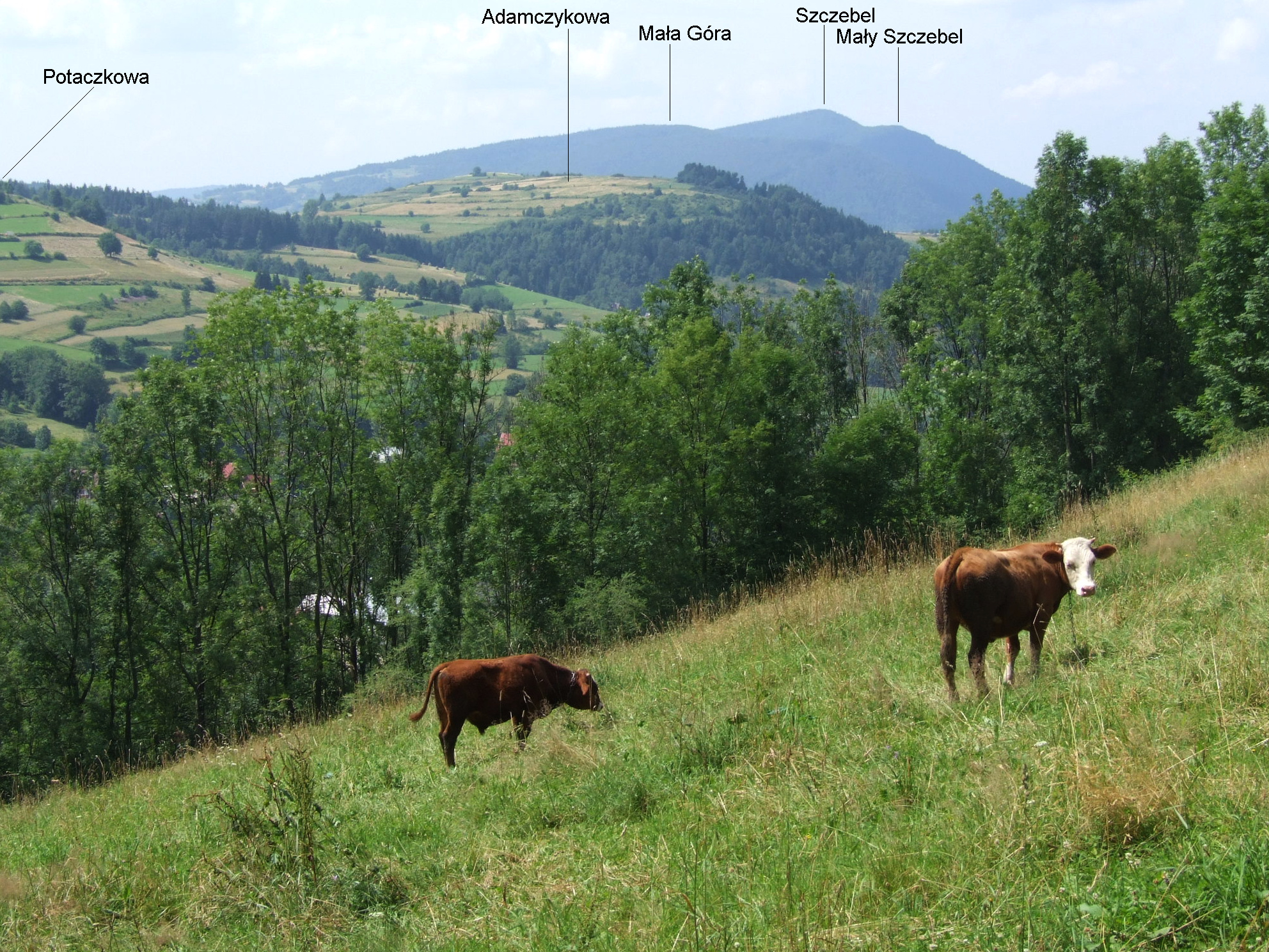 Widok z podnóży Spyrkowej